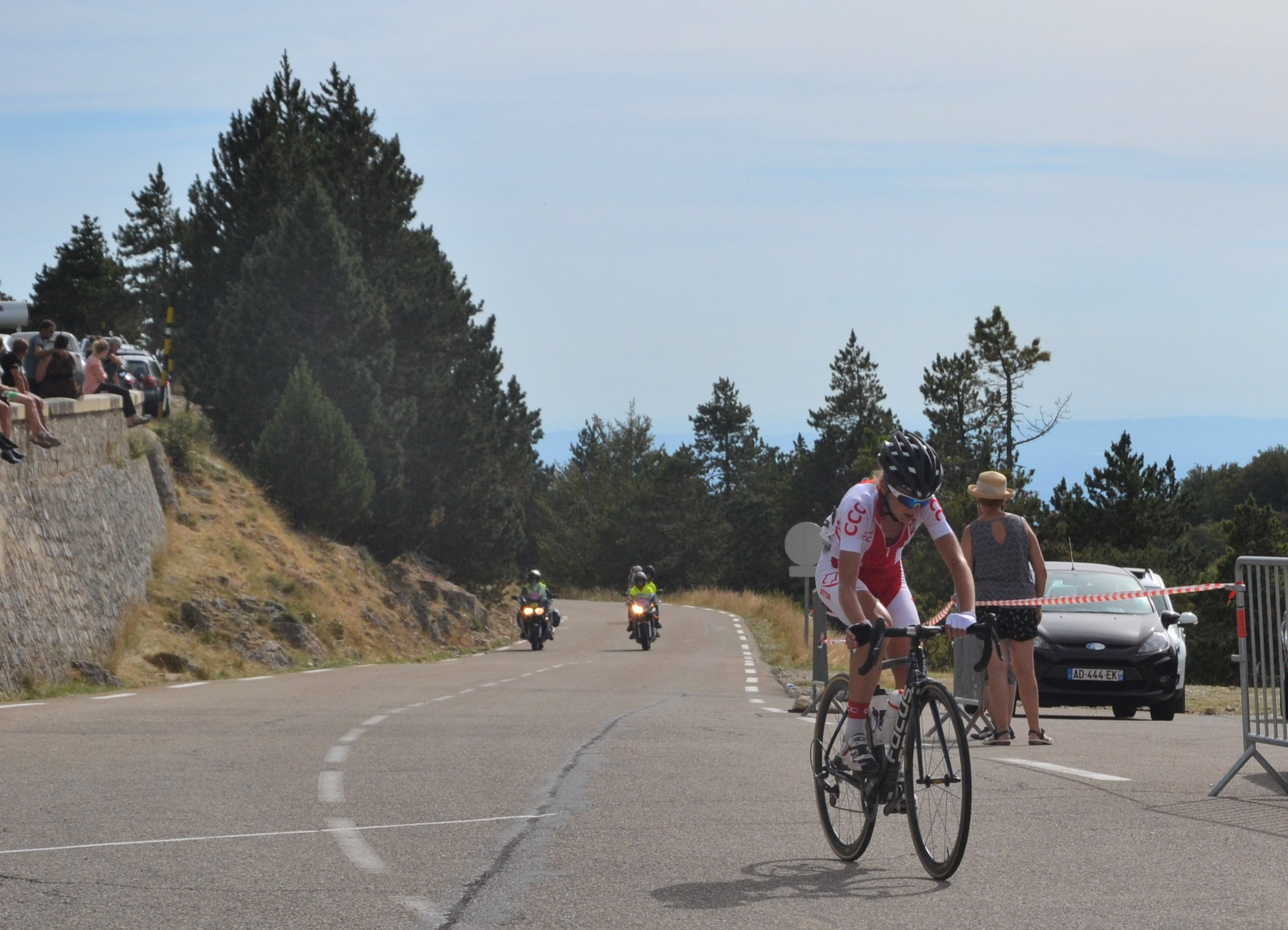 Tour féminin international de l'Ardèche 2016, 3ème étape, lors de l'ascension du Mont Ventoux.